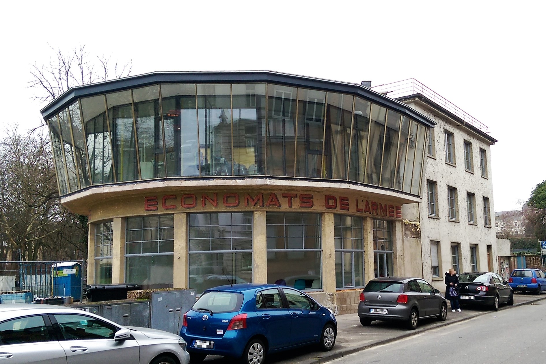 Trier, Theodor-Heuss-Allee 18a. Zustand nach Sanierung und Umbau für eine Arztpraxis im Jahr 2018. Bei der Sanierung wurden alte Aufschriften „Économats de l'Armée“ an der Fassade freigelegt; die Économats dienten vermutlich der Versorgung der in Trier stationierten französischen Militärangehörigen. Auffallend ist auch der Einbau einer kompletten zweiten Fensterfront hinter der ursprünglichen Glasfront im Obergeschoss; dies dürfte ein Kompromiss zwischen zeitgemäßer Isolierung und denkmalmäßiger Erhaltung der äußeren Glasflächen sein. Blick von der Göbenstraße her.